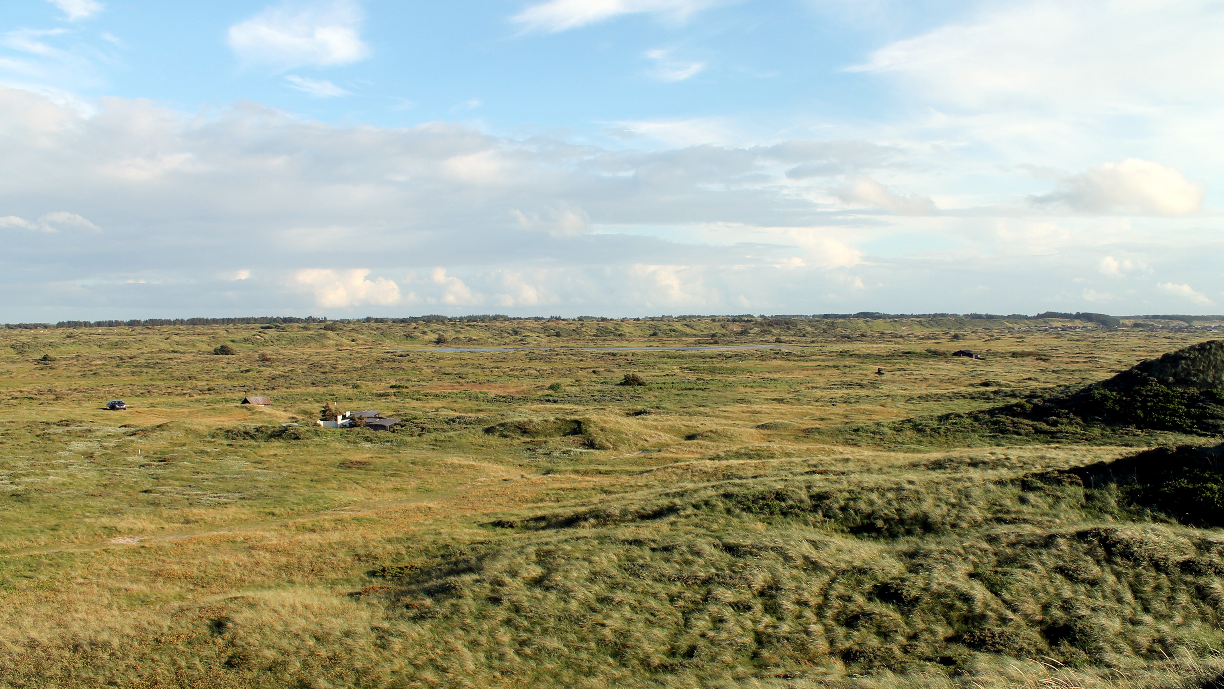 Vandplasken ved Kjærsgaard Strand.